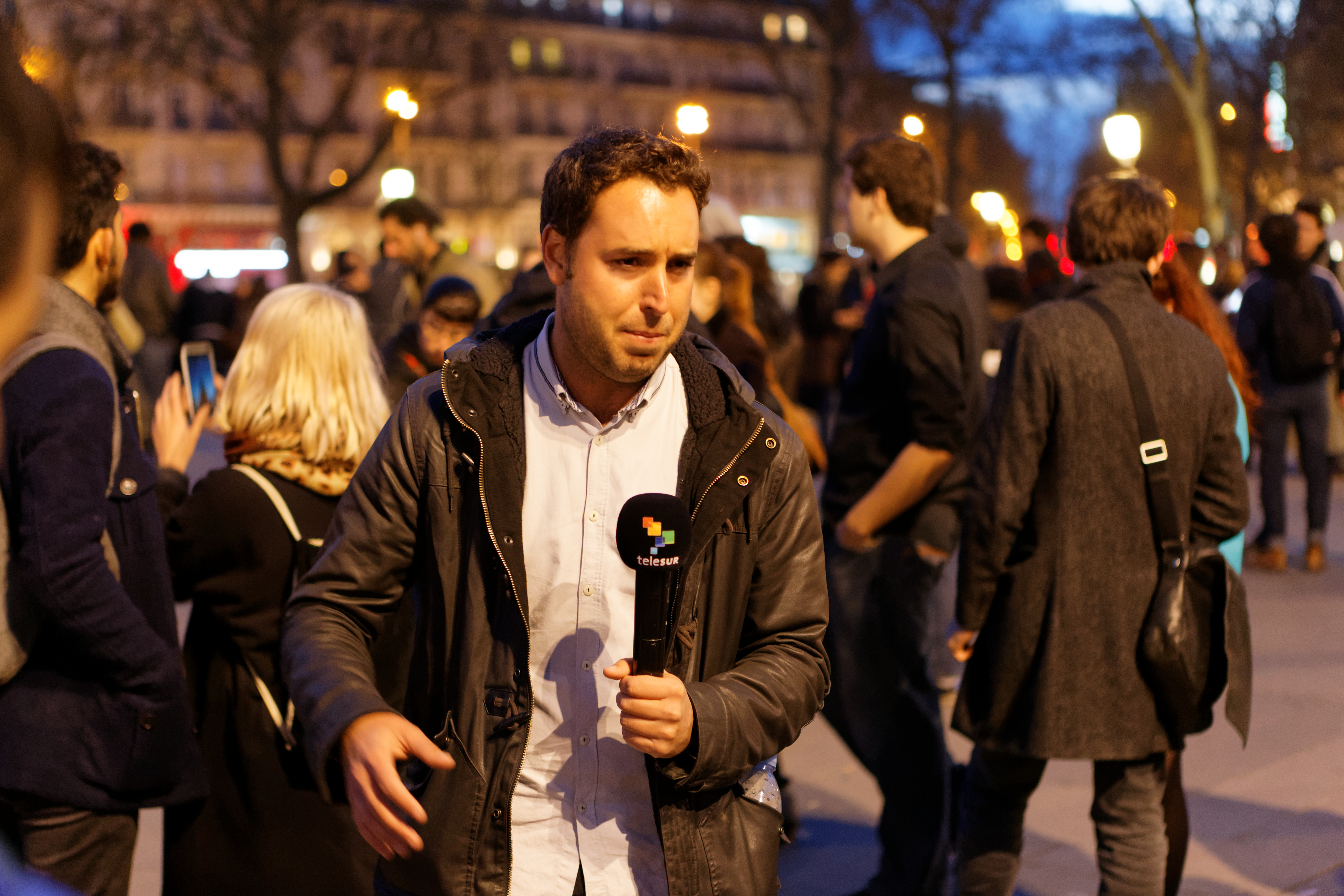 Rassemblement "Nuit Debout" à Paris le 42 mars.